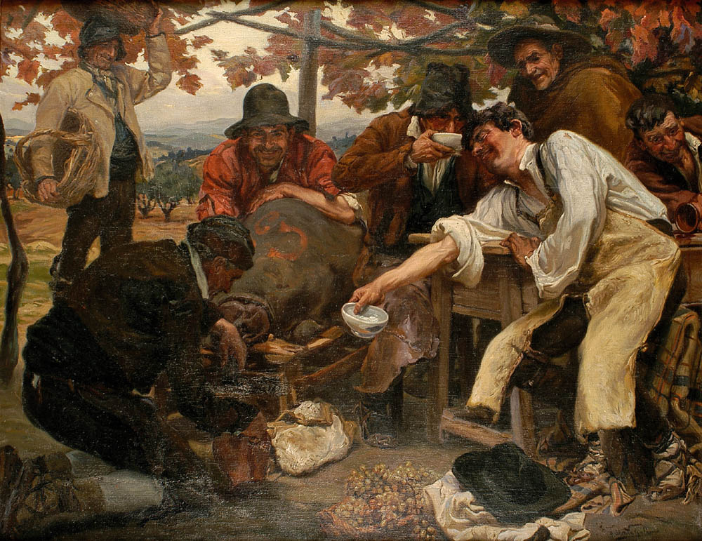 Después de la vendimia, óleo sobre lienzo de 146 x 188 cm, realizado por el pintor Álvaro Alcalá Galiano (1873-1936)